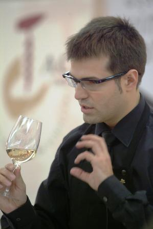 César Cánovas